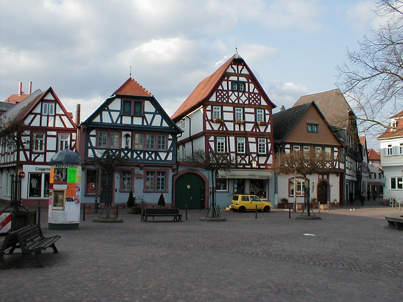 Seligenstadt, Marktplatz.